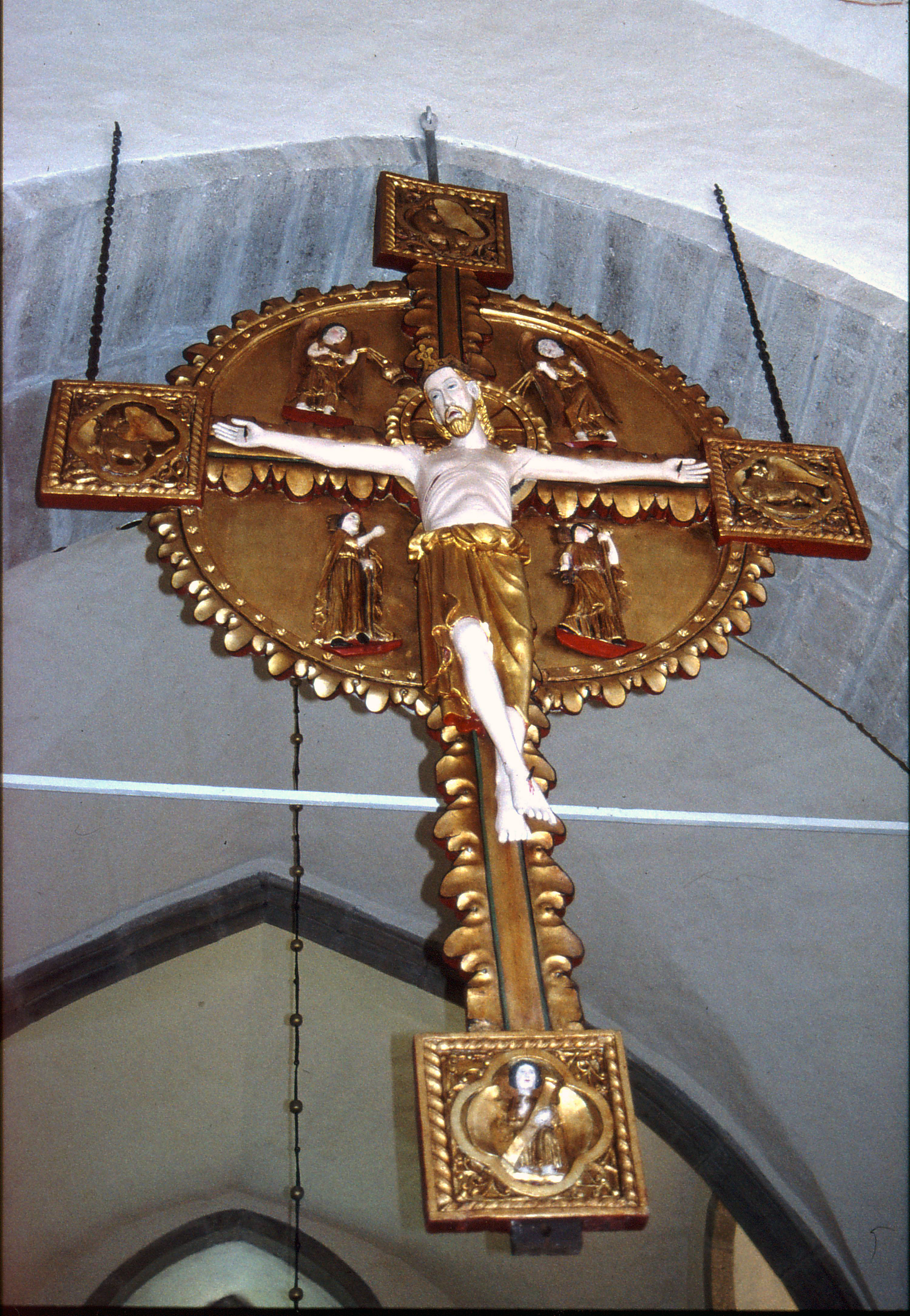 Eskelhem.Triumfkrucifix 1200-t av Tingstädemästaren